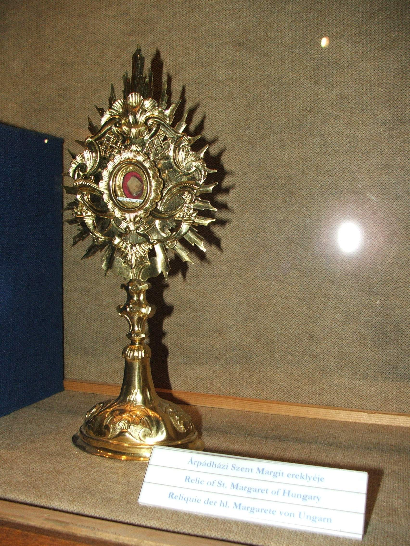 Árpád-házi Szent Margit ereklyéje